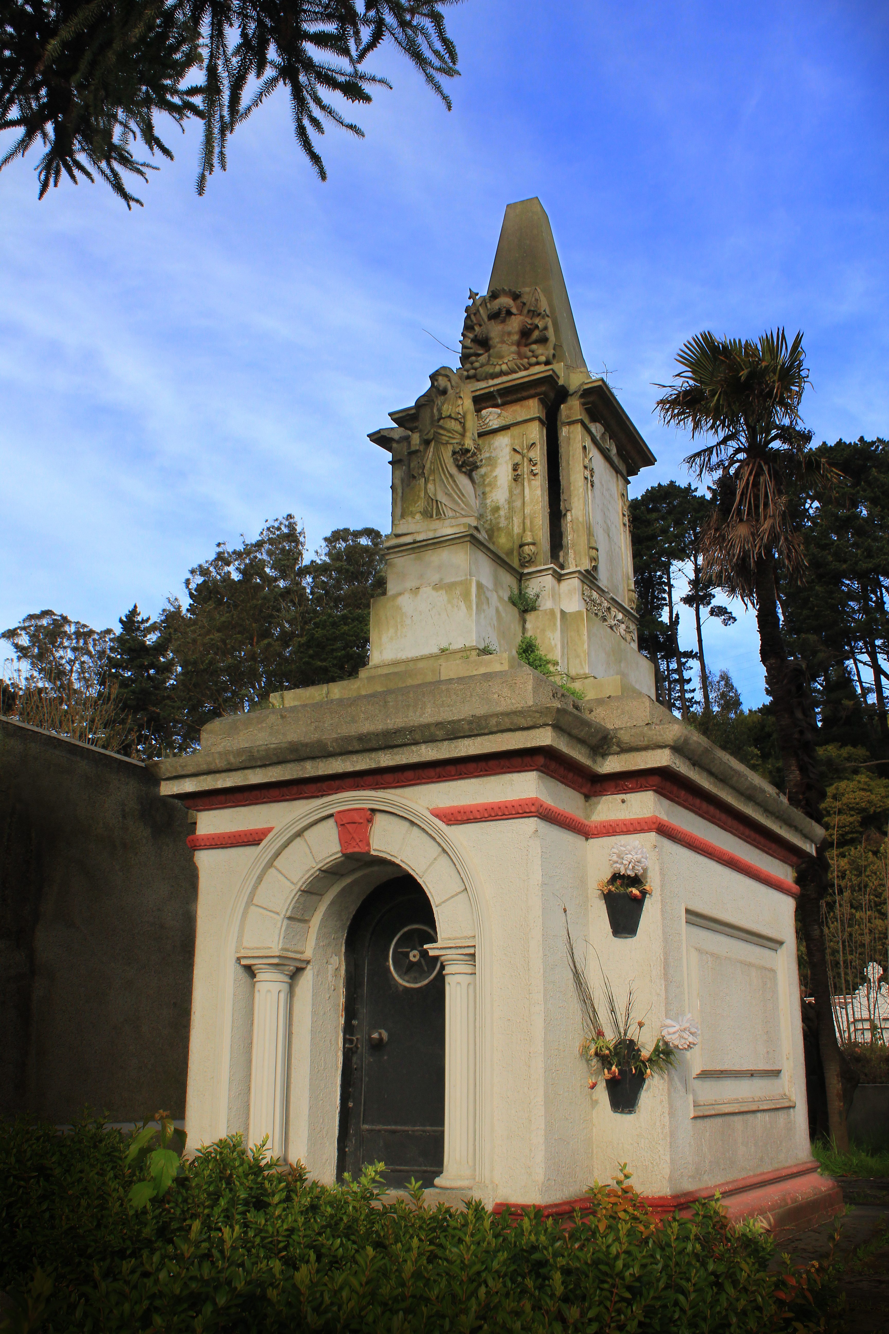 Mausoleo del General José María de la Cruz_Cementerio General Concepción This is a photo of a national monument in Chile: 656